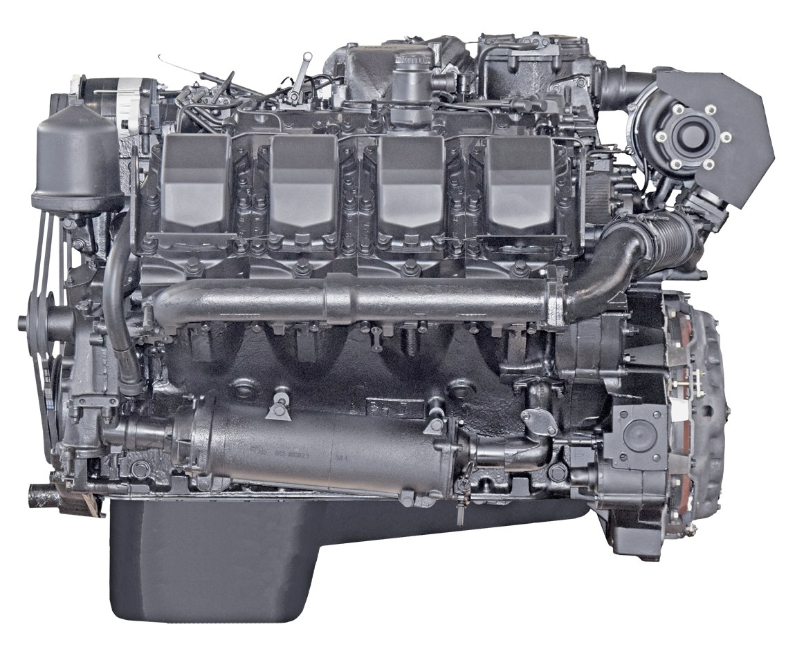 Продукция завода. ДВИГАТЕЛЬ ТМЗ МОДЕЛИ 8463.10.